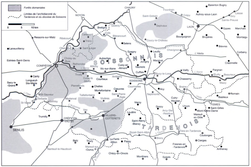 Les limites naturelles du Soissonnais